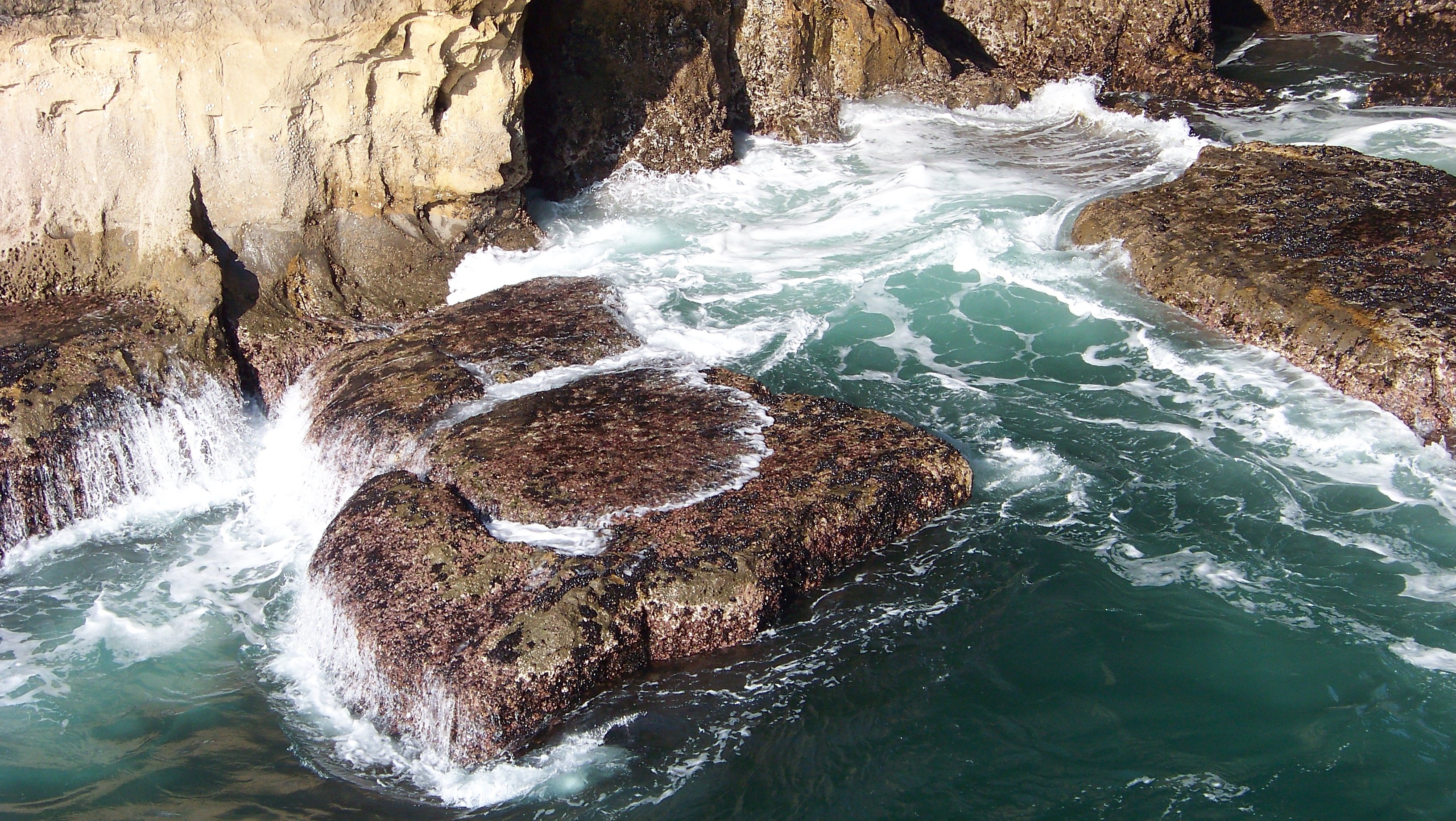 Sintra/Cascais. Plataforma intermareal rocosa cubierta por algas calcáreas y mejillones.